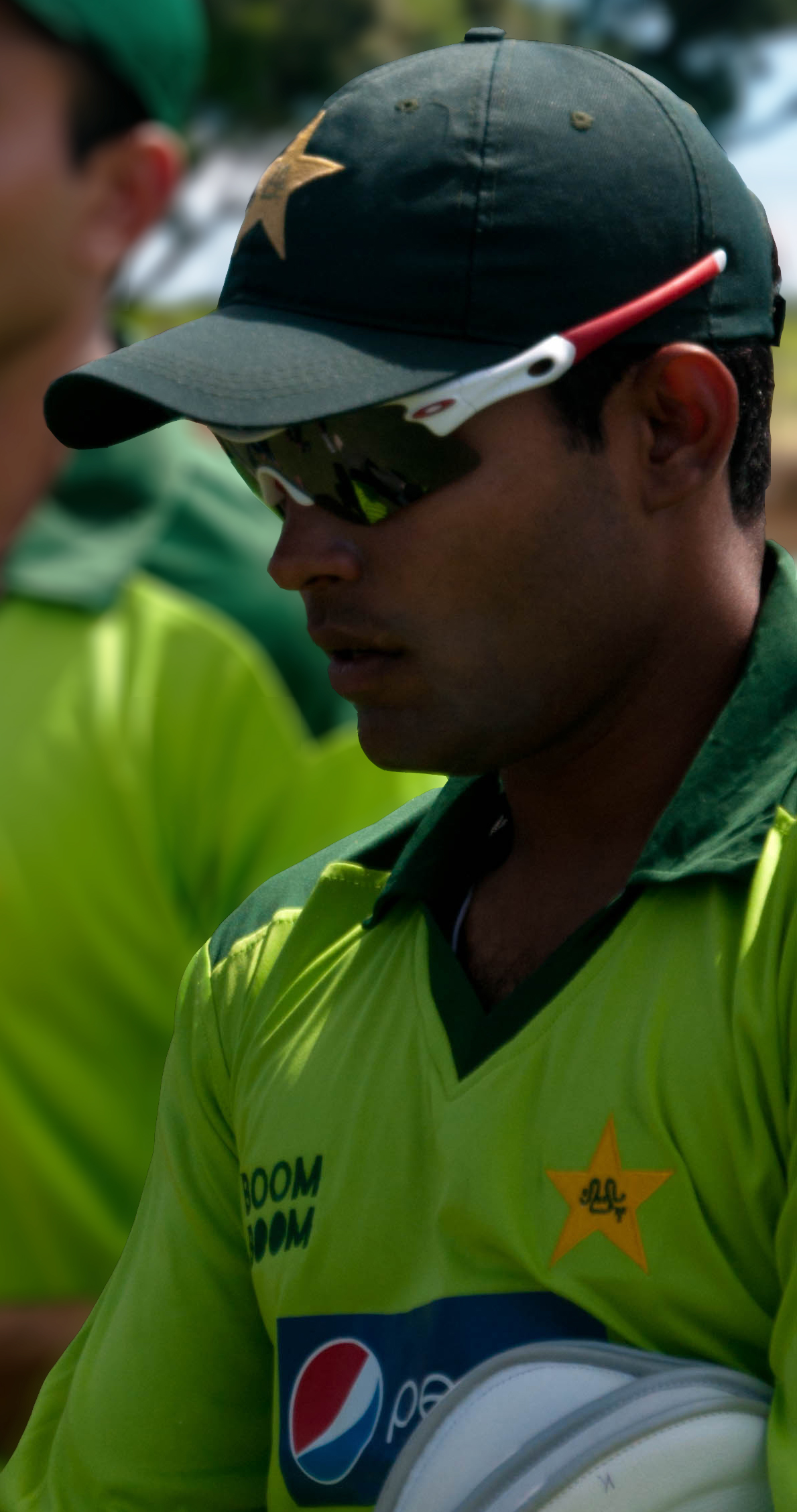 Umar Akmal Profile